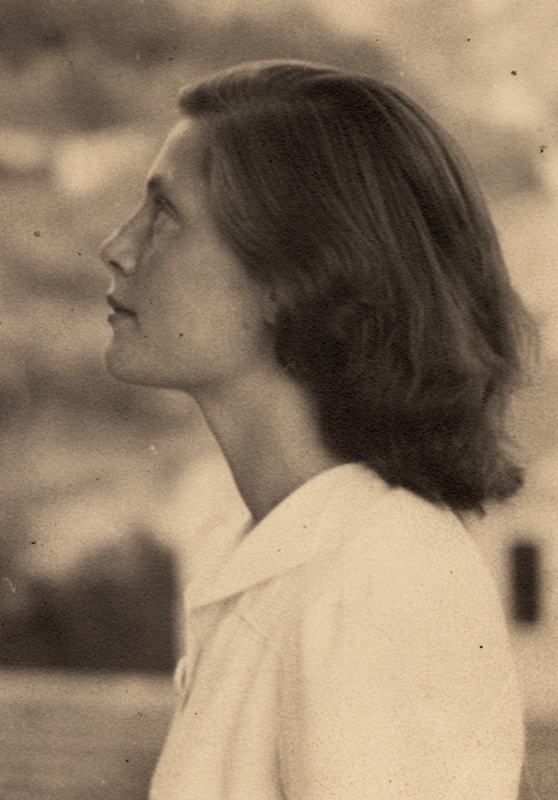 Foto della partigiana Walkiria Terradura